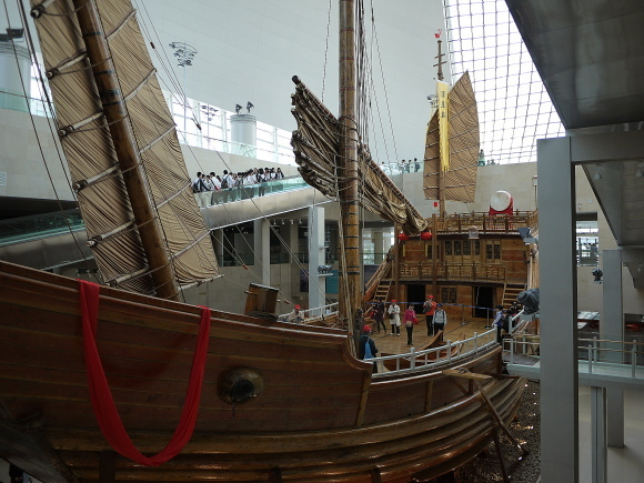 中国航海博物馆大厅中央的福船